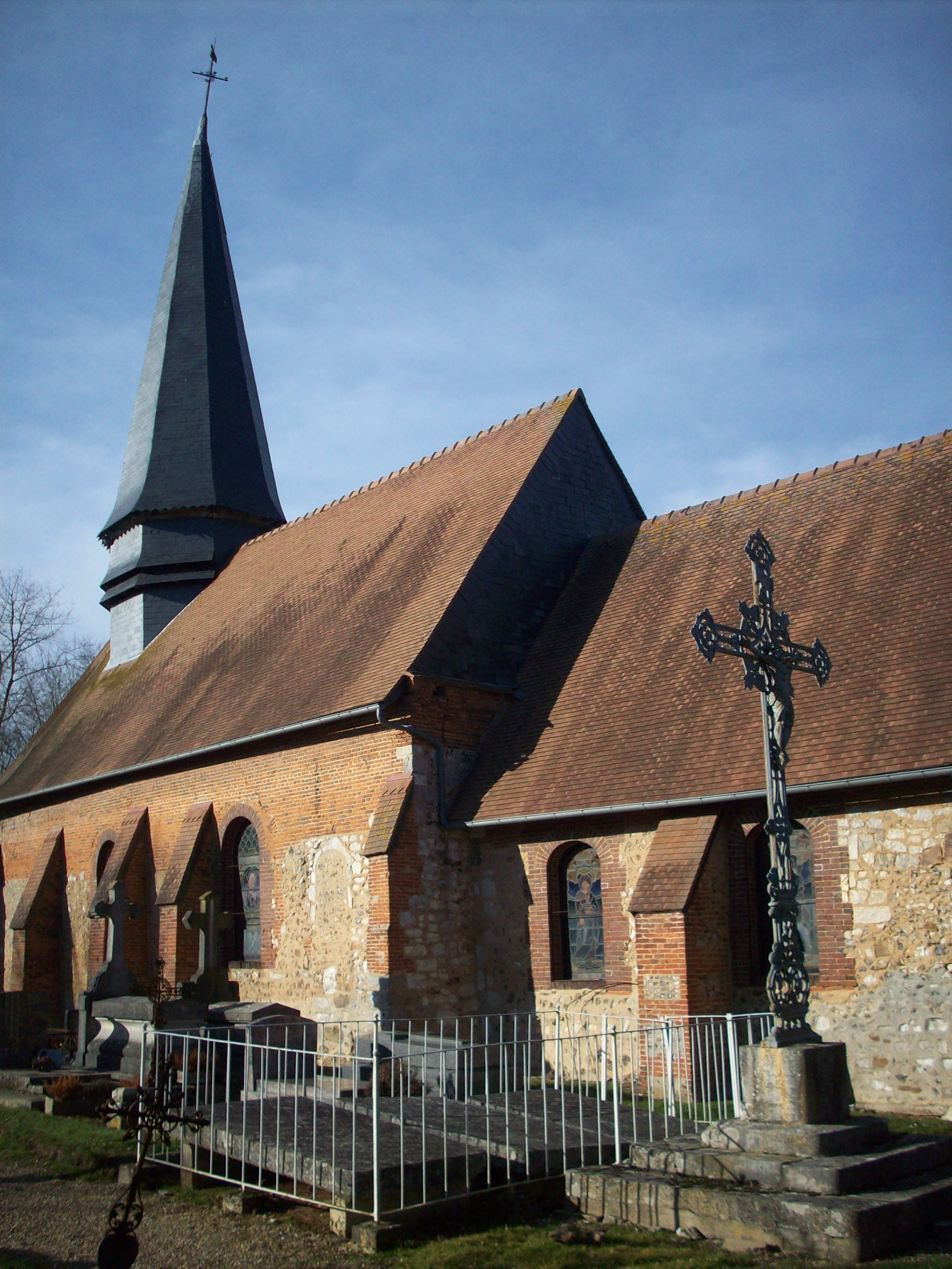 Église Saint-Pierre-Saint-Paul de Lilly.